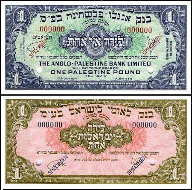 החלפת לירה אנגלו פלשתינה בלירה בנק לאומי